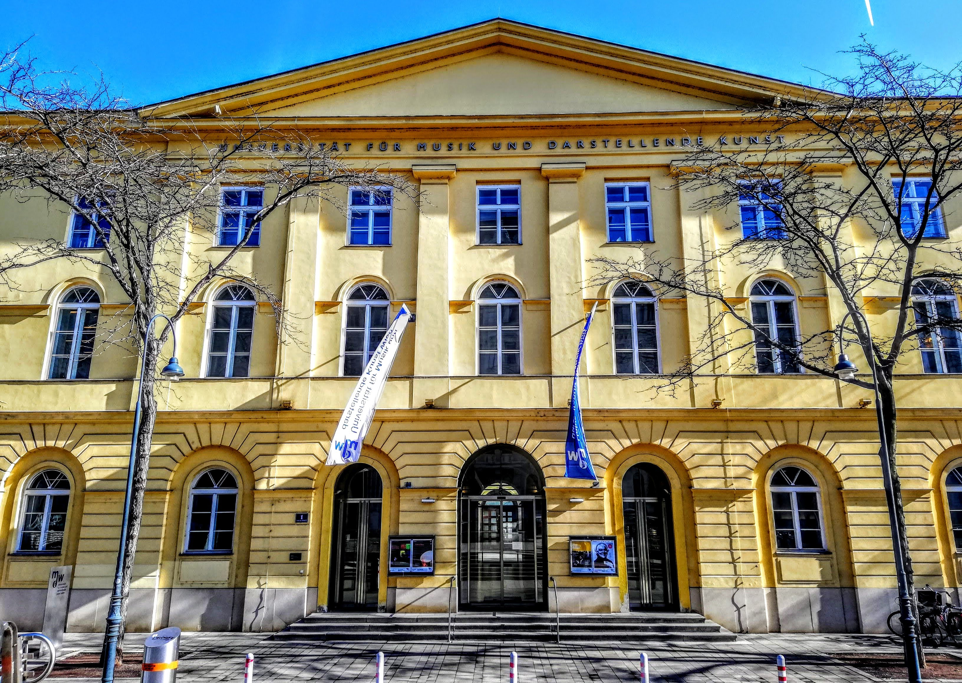 University of Music and Performing Arts Vienna